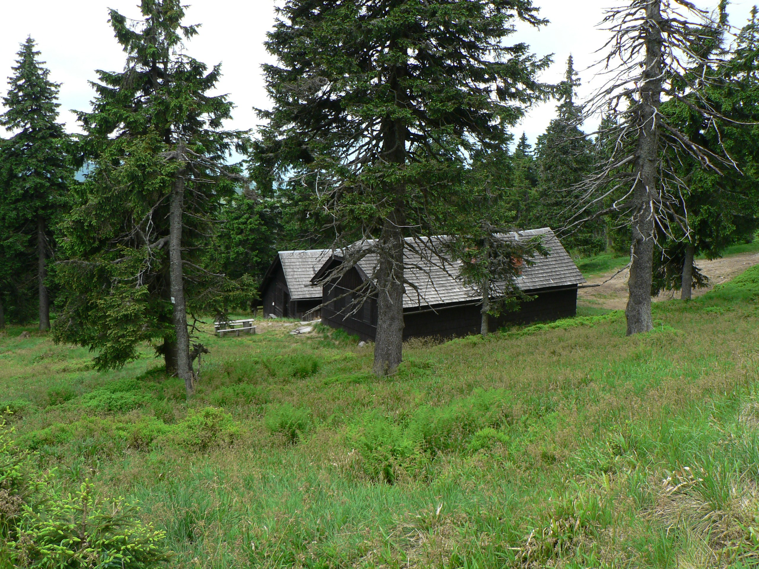 Lovecká chata Formanka pod Vozkou.